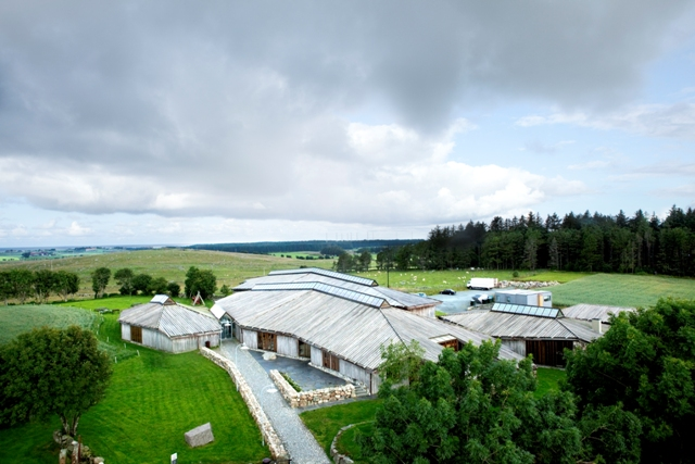 Vitensenteret Vitengarden i 2010, der administrasjonen til Jærmuseet har sine kontor.